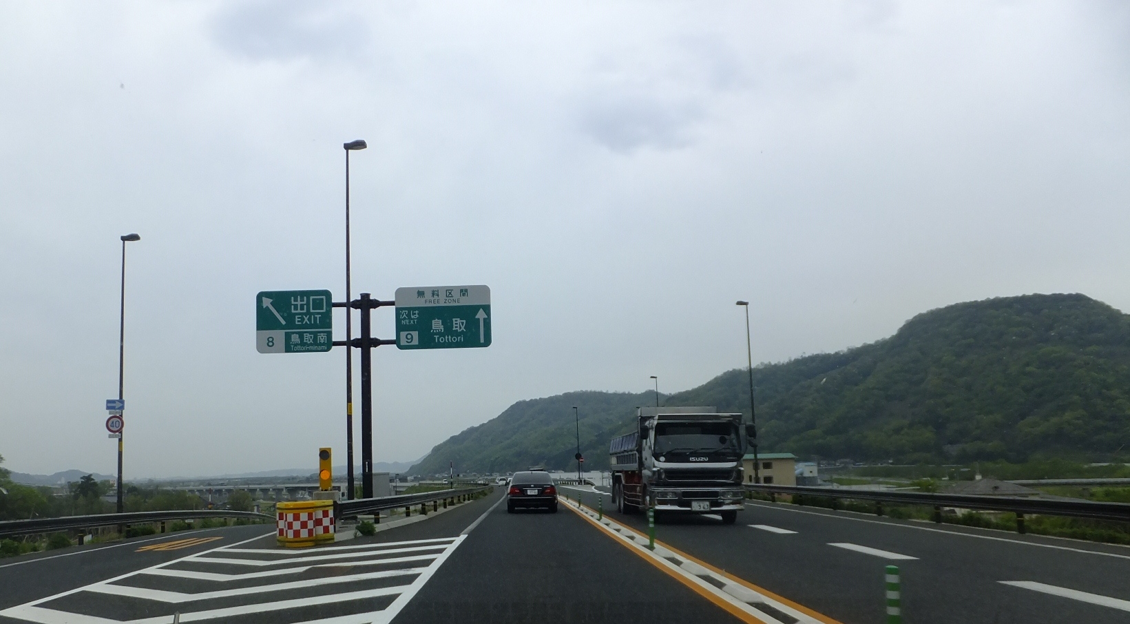 鳥取県鳥取市河原町布袋 鳥取自動車道・鳥取南インターチェンジ